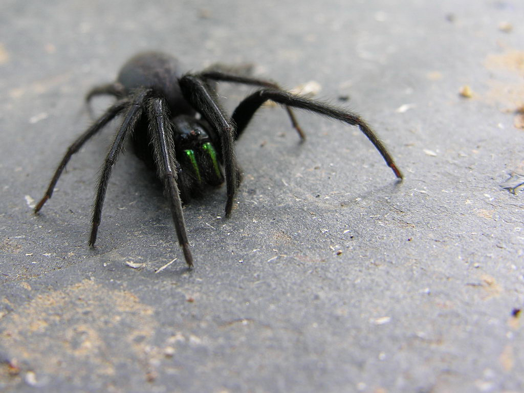 Foto dunha araña realizada en Mandaio, Oza dos Ríos, Galicia Publish by= Luis Miguel Bugallo Sánchez.